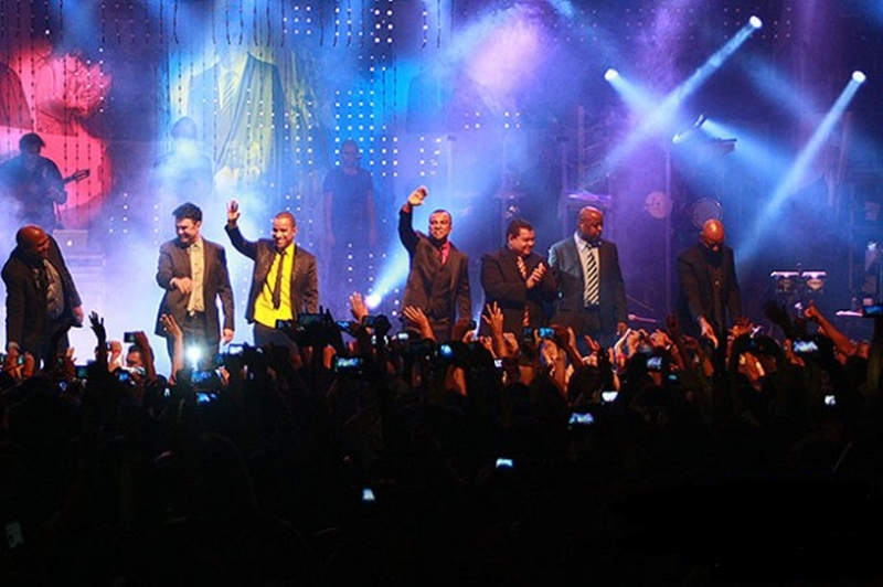 O grupo musical brasileiro Só pra Contrariar se apresenta no Distrito Federal.